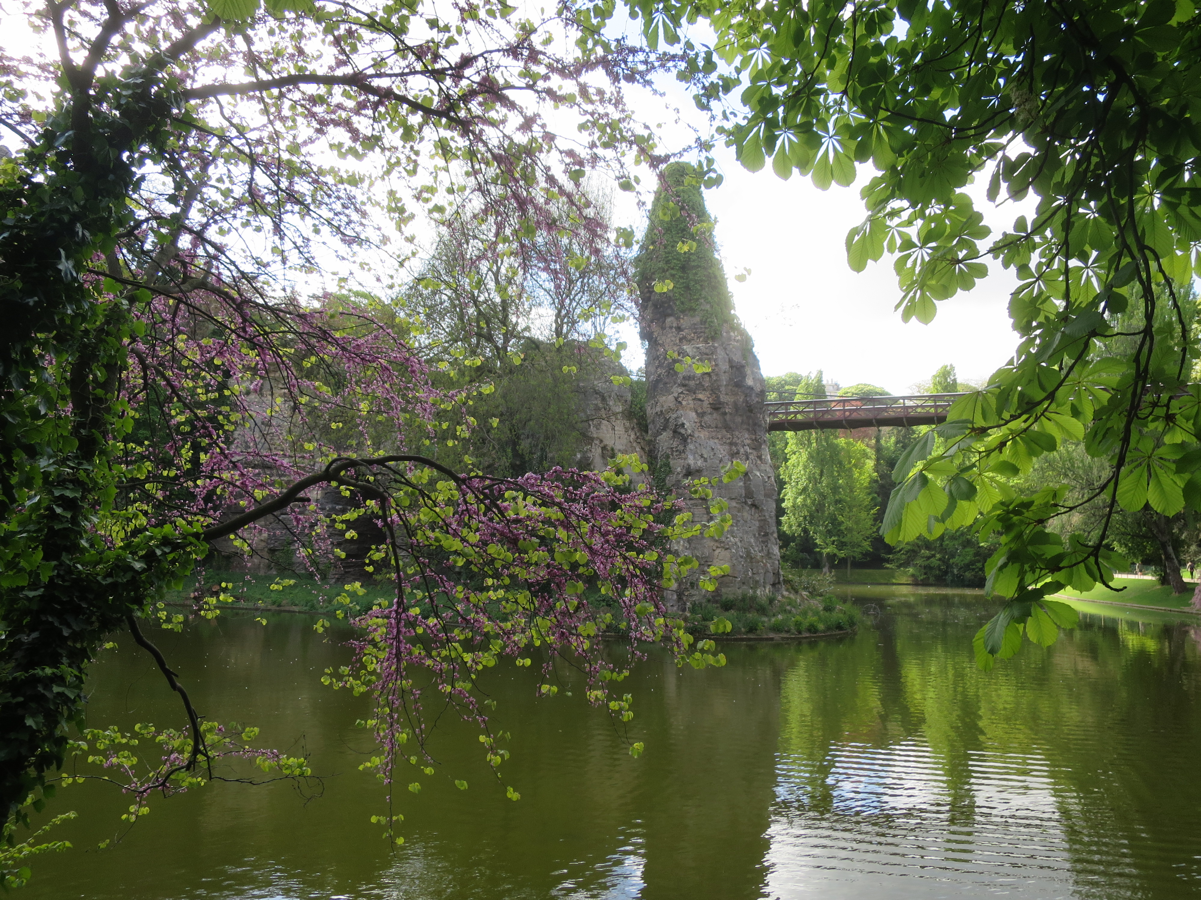 Felsnadel im Parc des Buttes-Chaumont